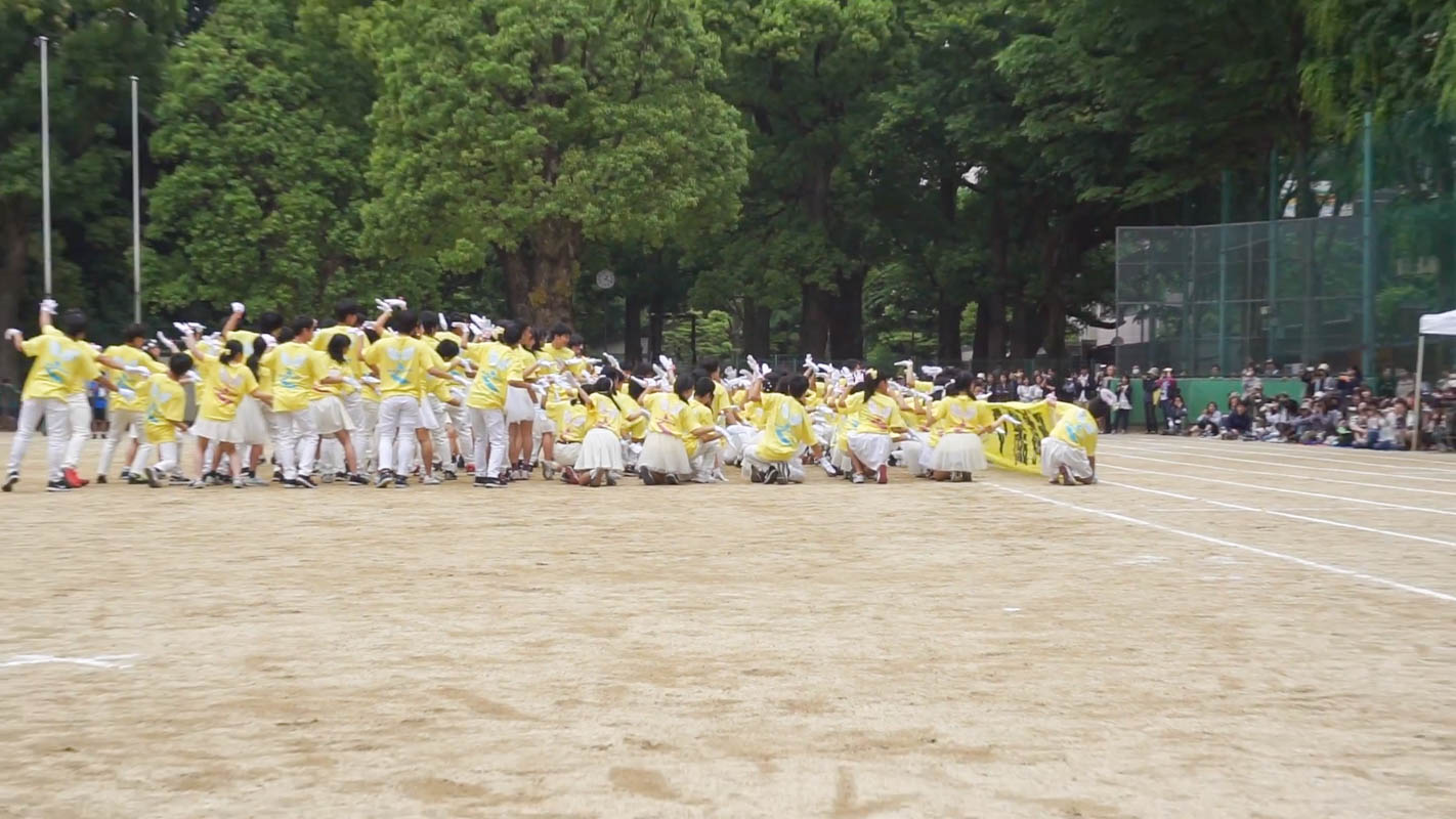 東京都立竹早高等学校、体育祭。団別のパフォーマンスの様子。